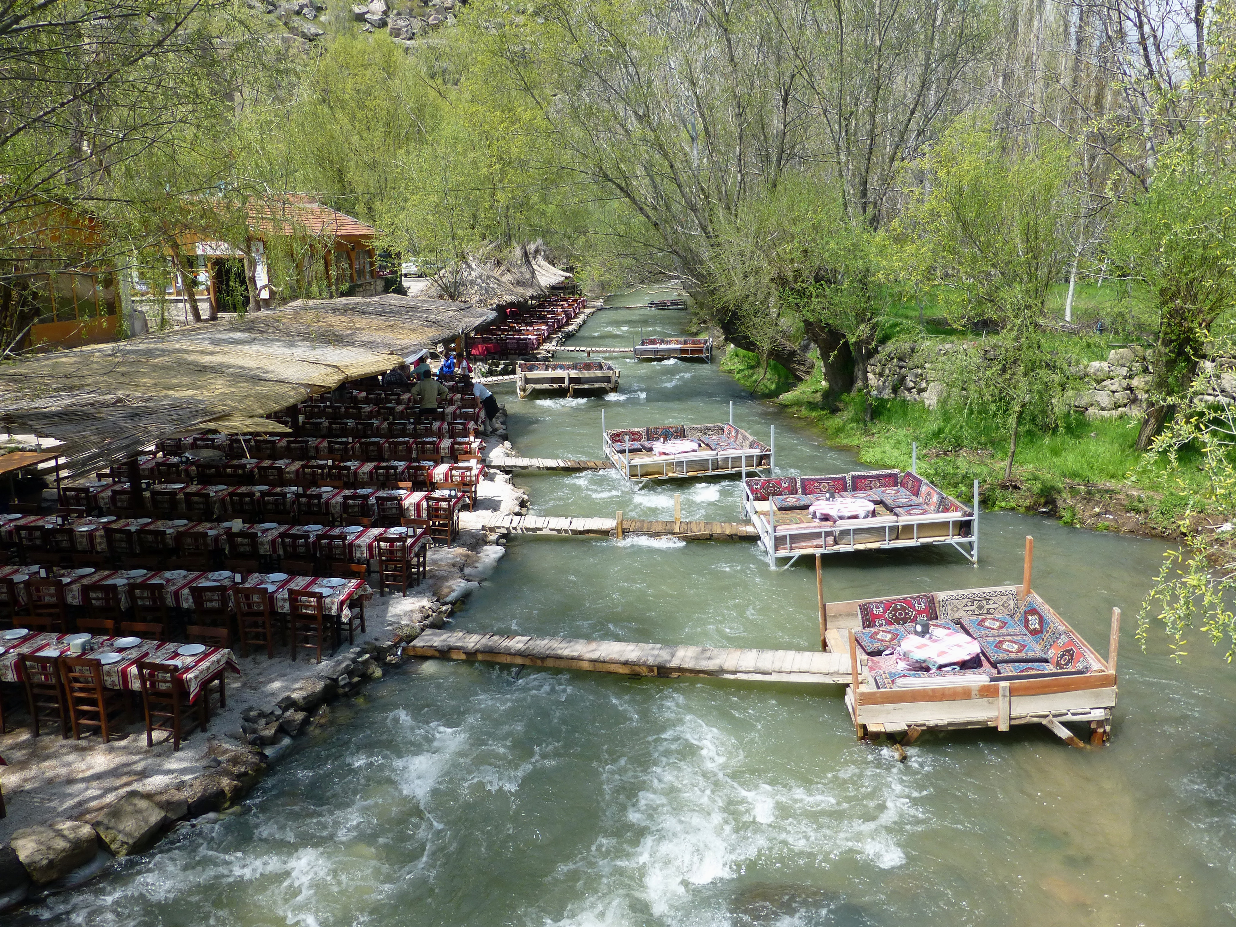 Belisirma (vallée d'Ihlara, Cappadoce, Turquie) : restaurants au bord du Melendiz